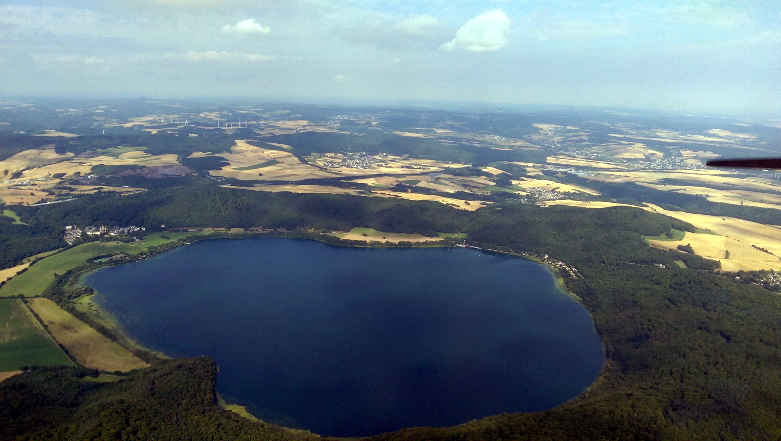 Laacher See, Luftaufnahme